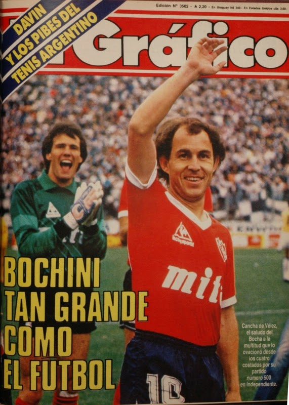 Ricardo Bochini cumple 500 partidos con Independiente. Tapa de El Gráfico, Nº 3502.